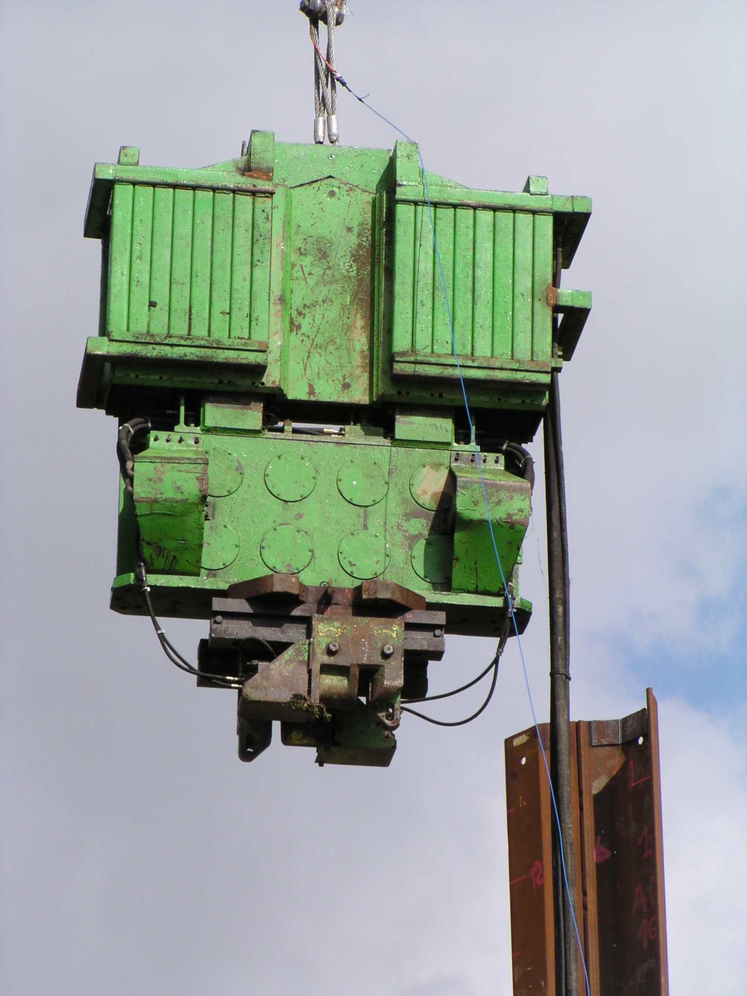 photo de vibrateur